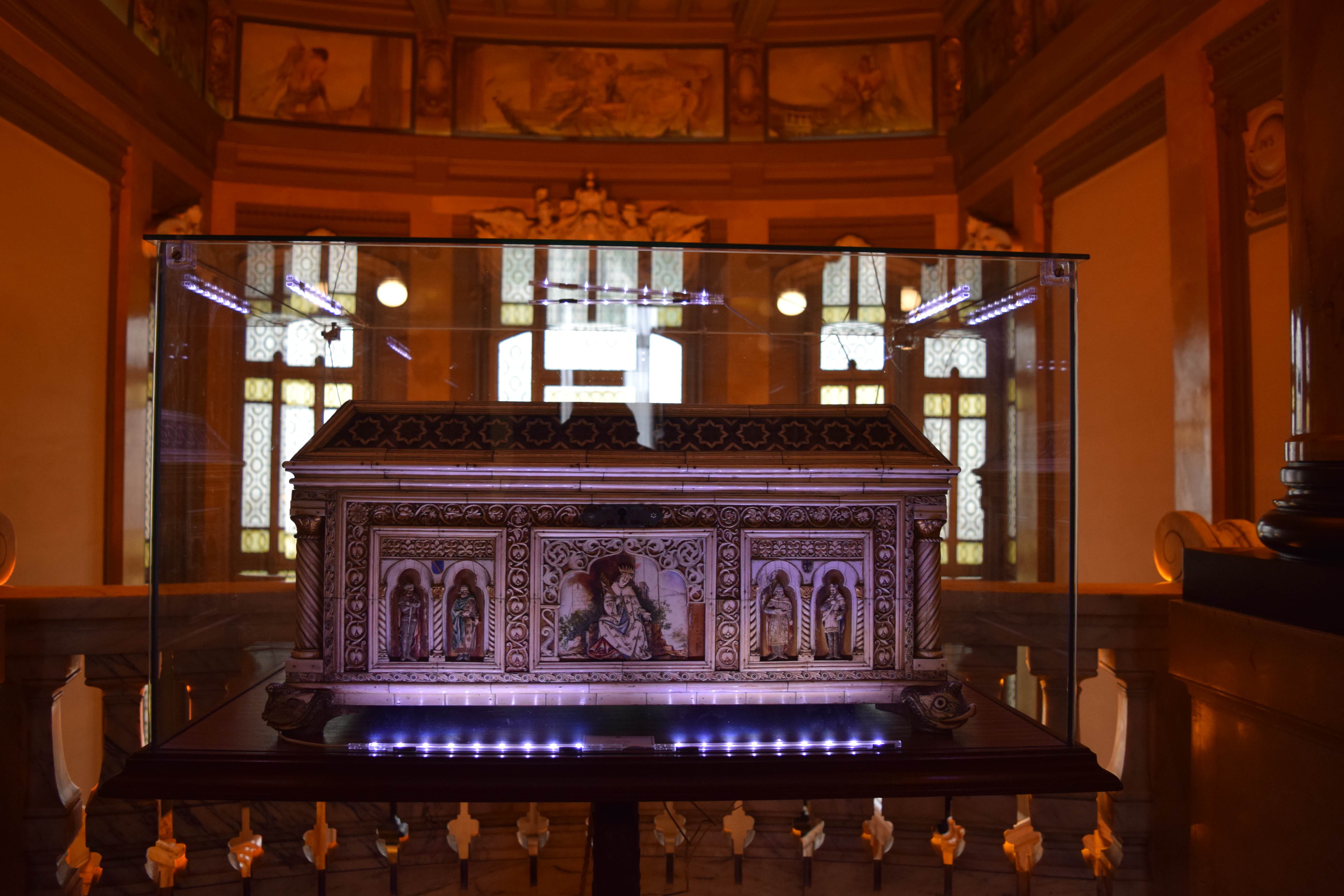 il Cofano portabandiera della corazzata Sicilia esposta a Palazzo Marina a Roma